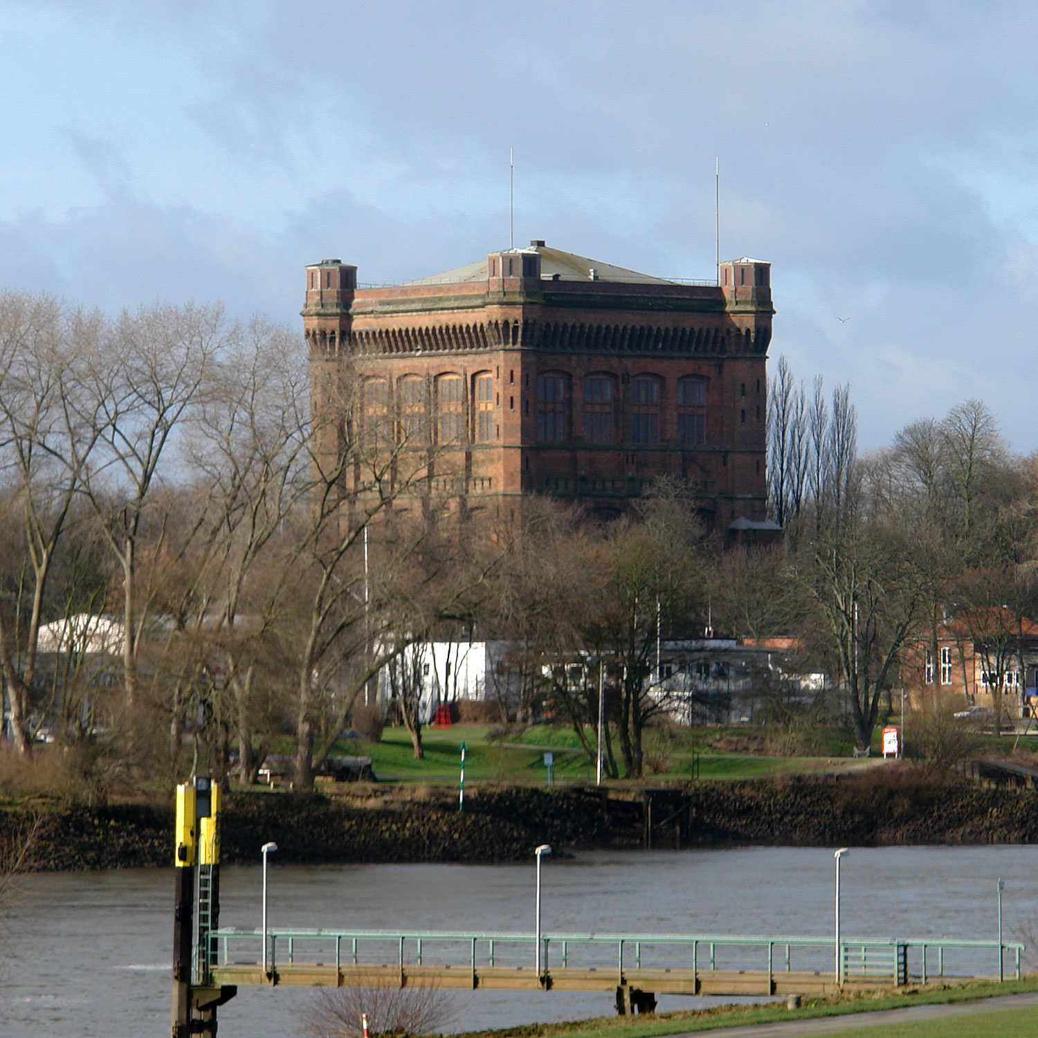 Bremen: Die "Umgedrehte Kommode". Das unter Denkmalschutz stehende ehemalige Wasserwerk (erbaut 1871–73 von Johann Georg Poppe) auf dem Stadtwerder. Blick vom Osterdeich. Das abgebildete Objekt ist ein geschütztes Kulturdenkmal in der Freien Hansestadt Bremen, mit der Nr. 1221 beim Landesamt für Denkmalpflege registriert.